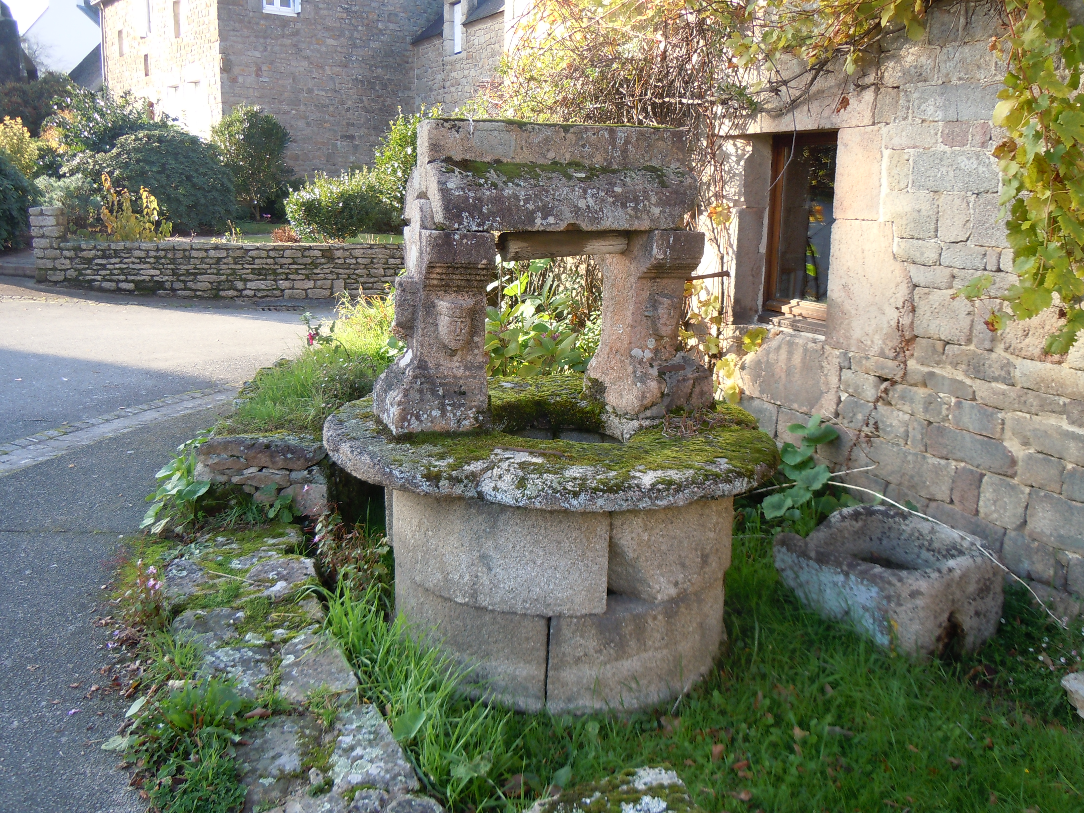 puits avec des montants sculptés situé dans le bourg de Lanvaudan (département du Morbihan)